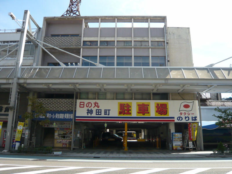 岐阜県の日の丸自動車本社。